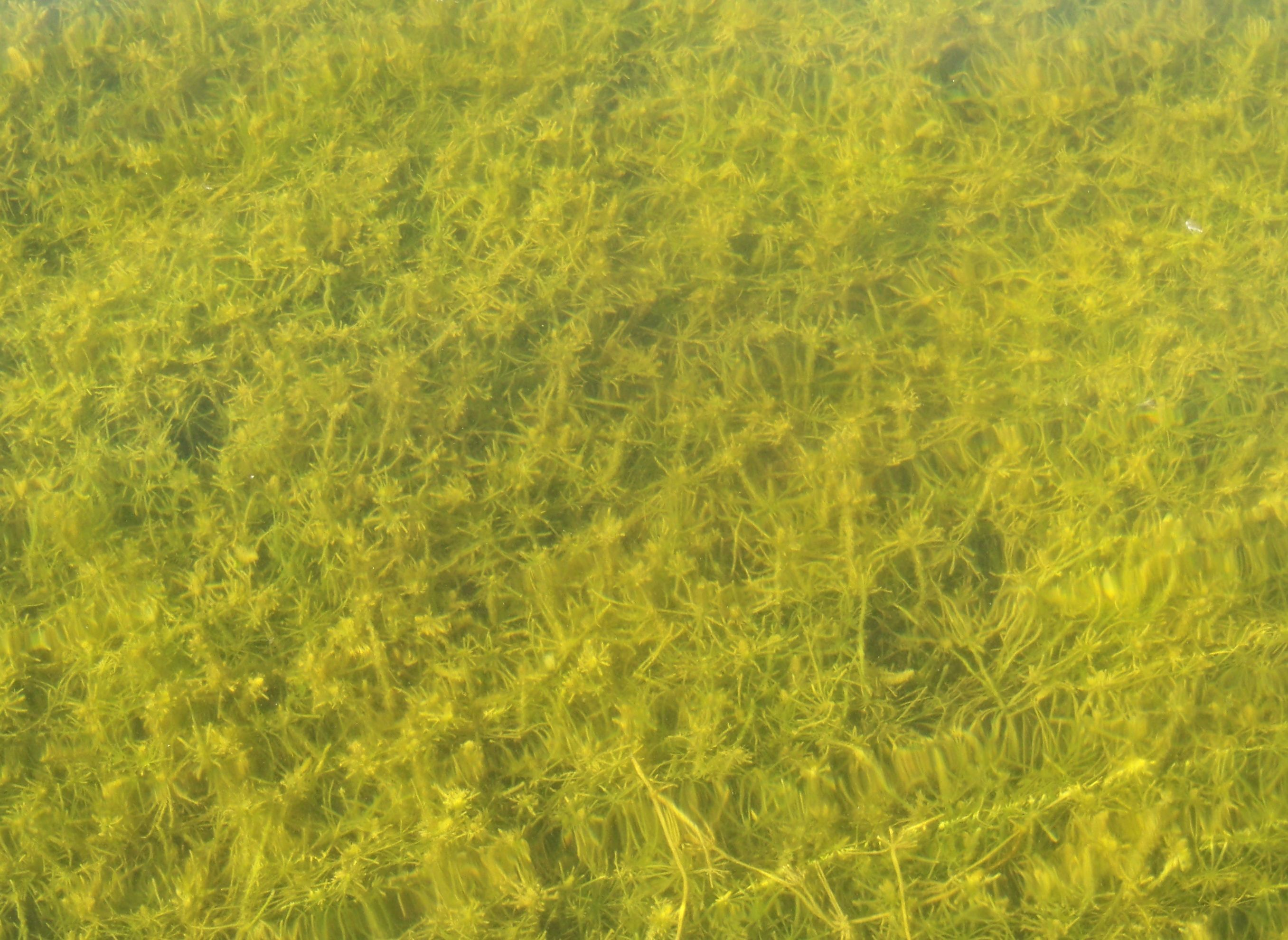 Łąka ramienicy kosmatej (Chara hispida) w Jeziorze Wielkowiejskim (Wielkopolski Park Narodowy)